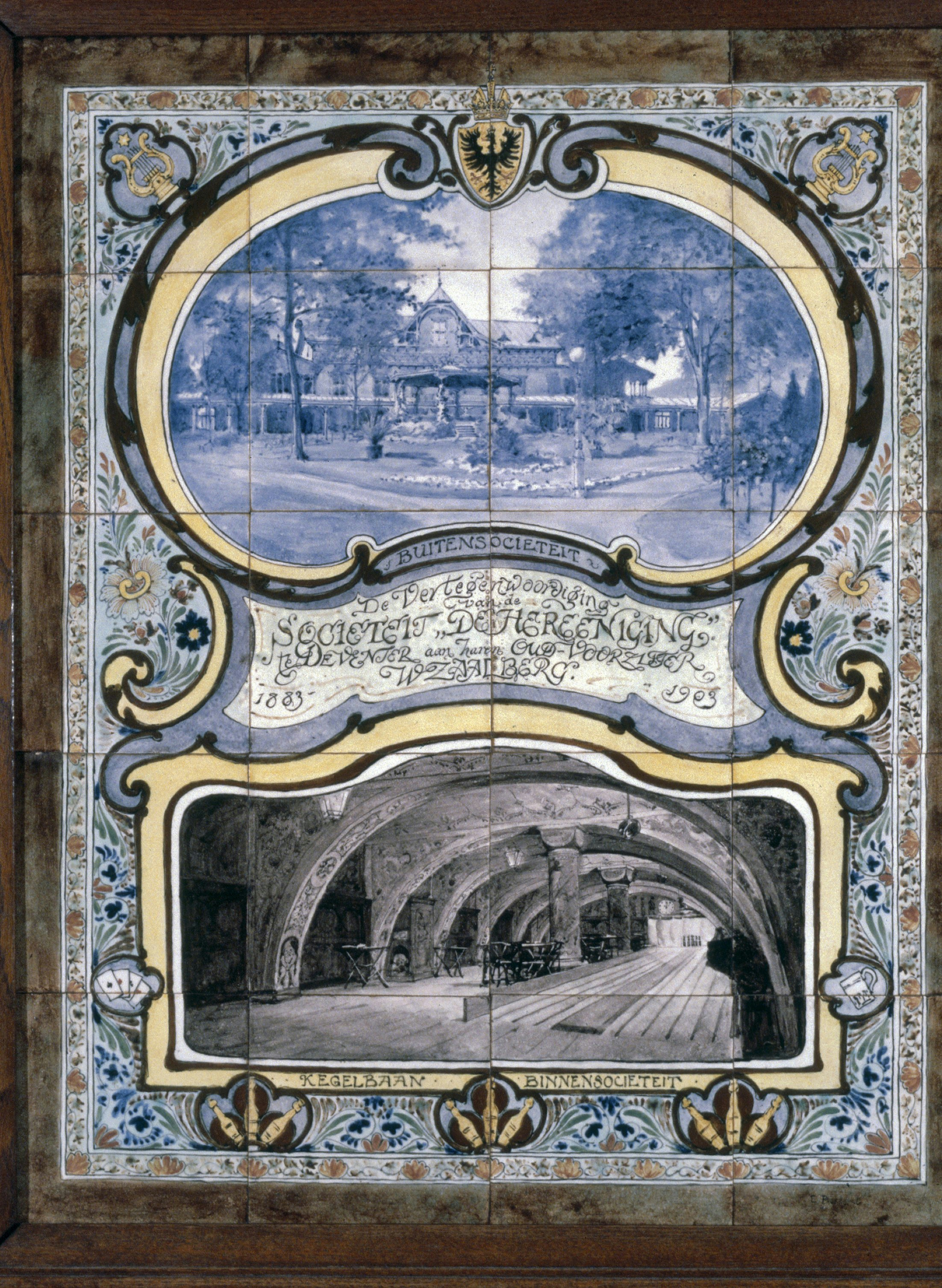 GEBOUW "DE HEREENIGING": INT. KELDER, TEGELTABLEAU